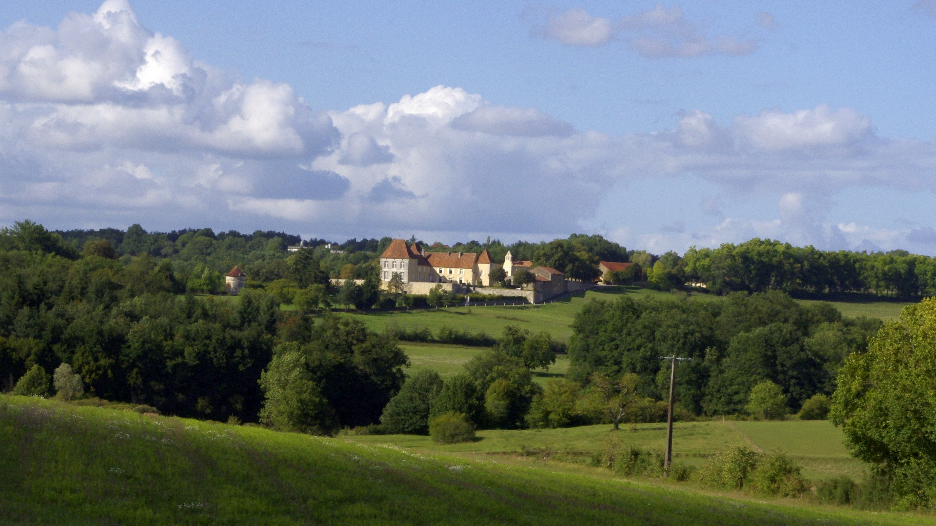 Connezac, château et église depuis la route menant au château de Combes.